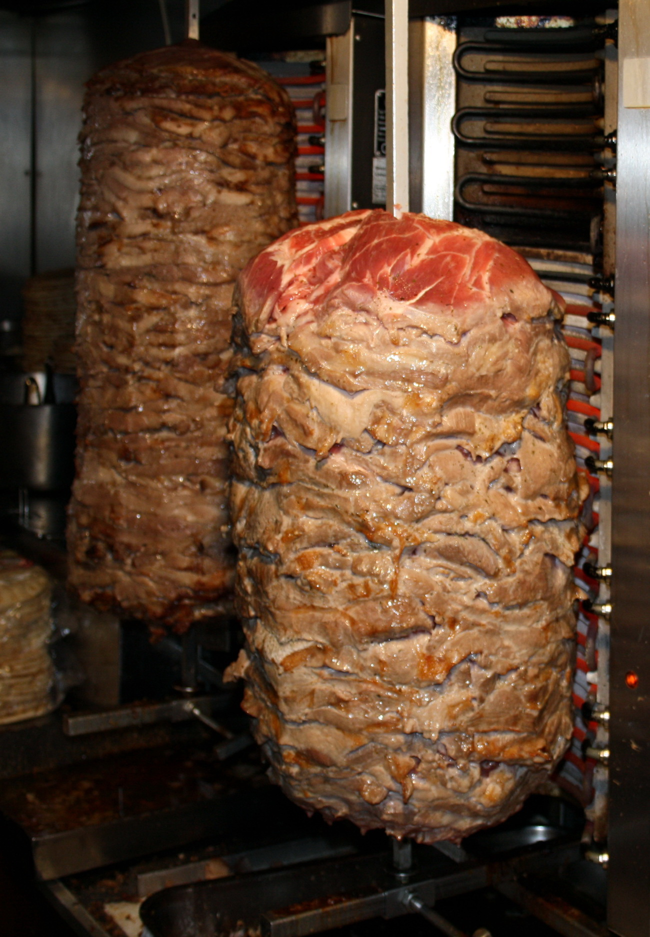 zwei Dönerspieße